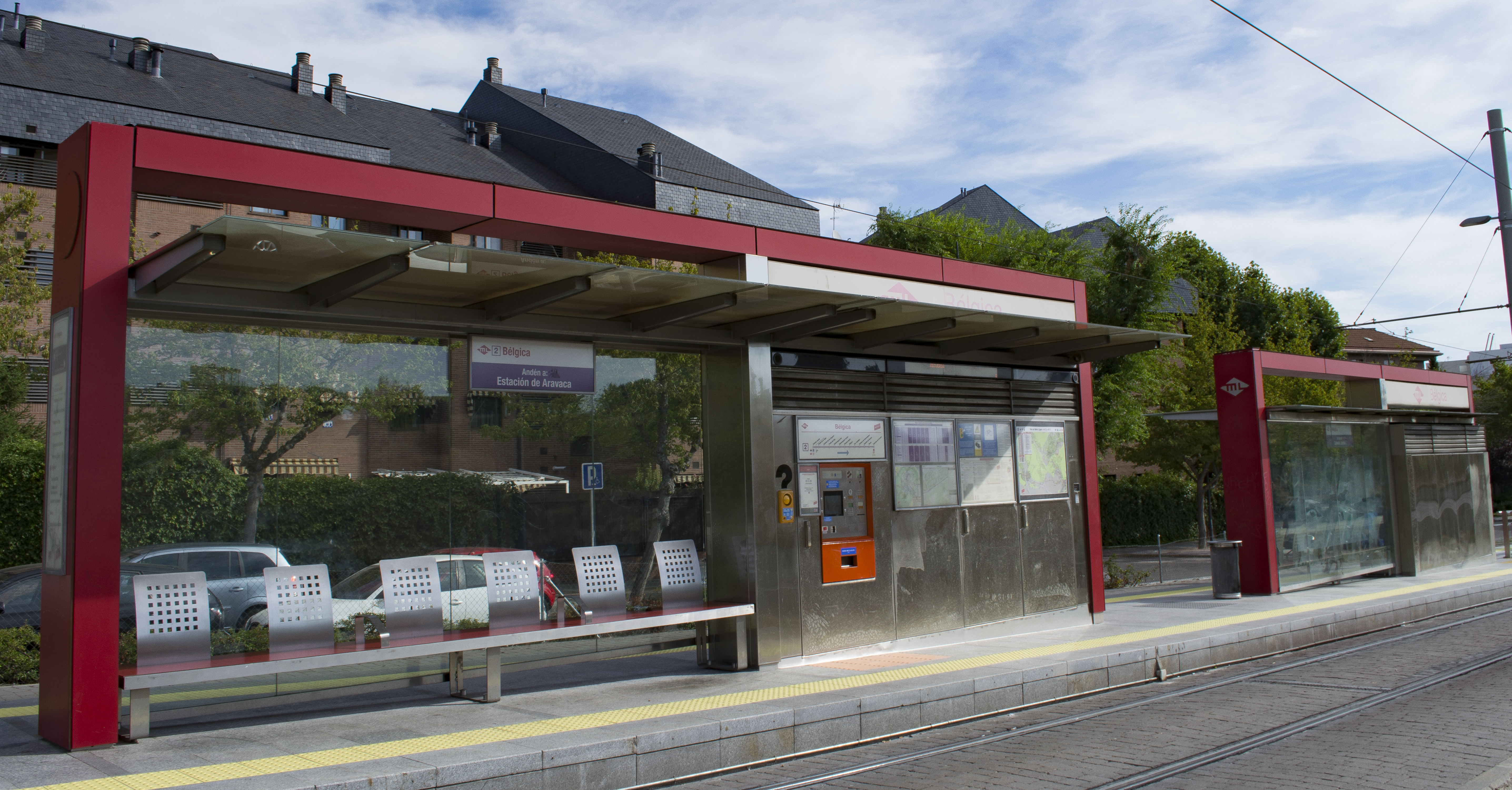 Situada en el tramo de la Vía Dos Castillas más cercano a la Avenida de Pablo VI, en el municipio de Pozuelo de Alarcón (Madrid).